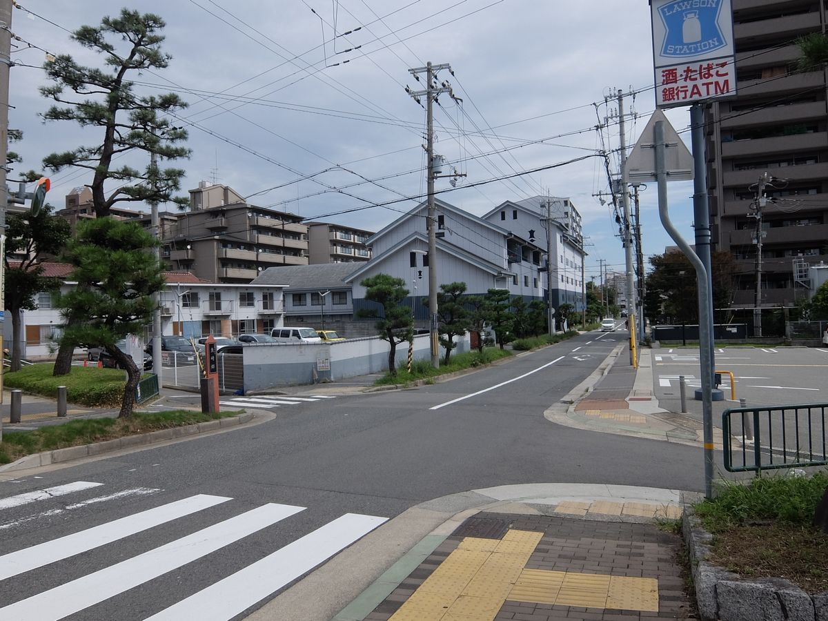 神戸市東灘区魚崎南町五丁目付近。島崎橋東詰から東方向。中央に見えるのは剣菱酒造魚崎蔵。